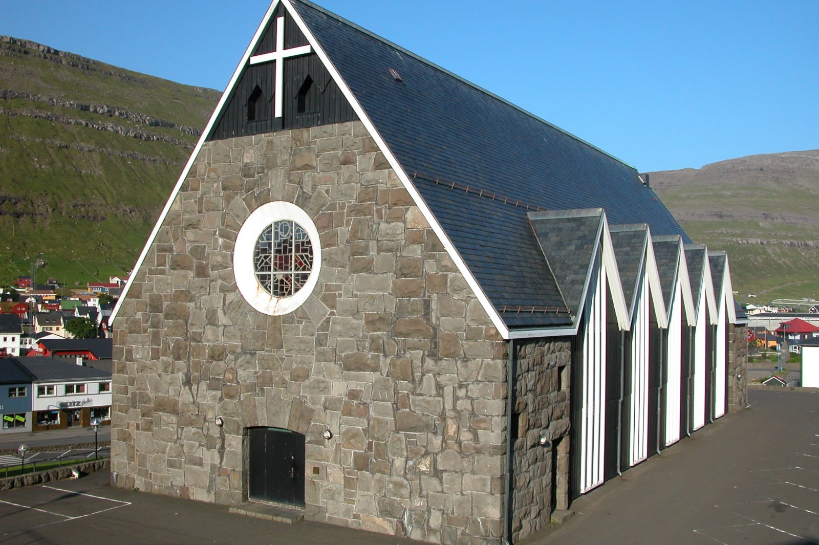 Christianskirkjan i Klaksvík på Færøerne Foto: Erik Christensen